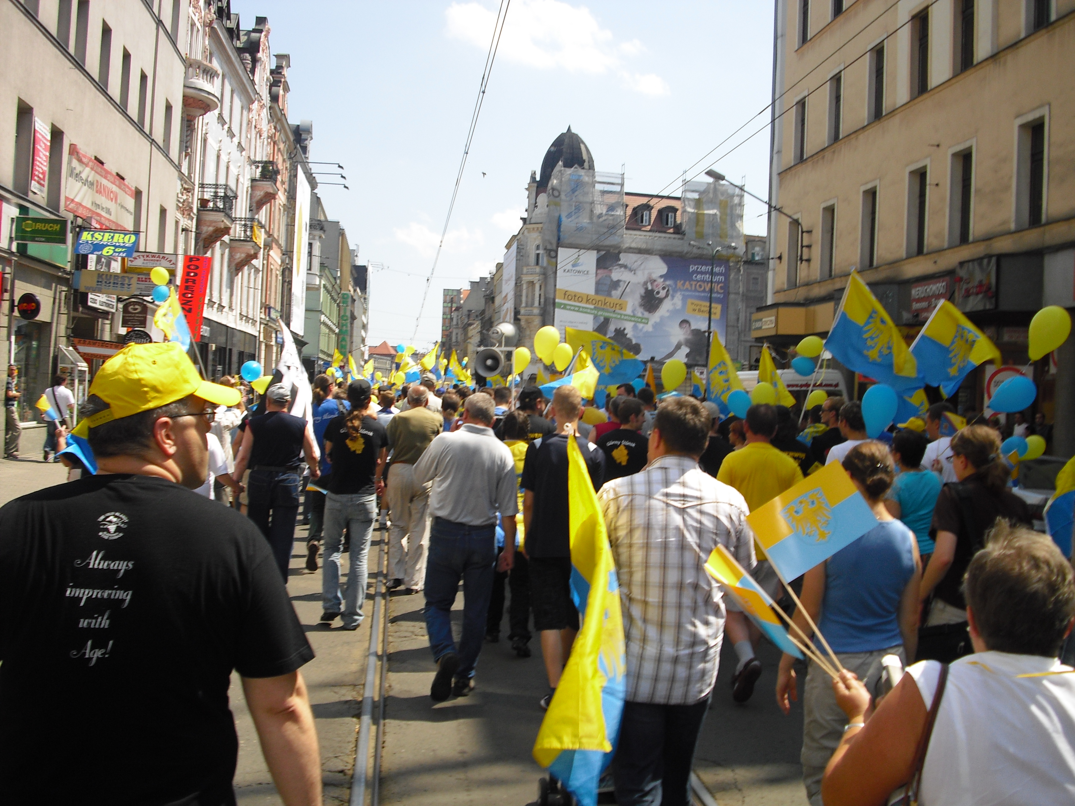 III Marsz Autonomii, Katowice, 18.07.2009